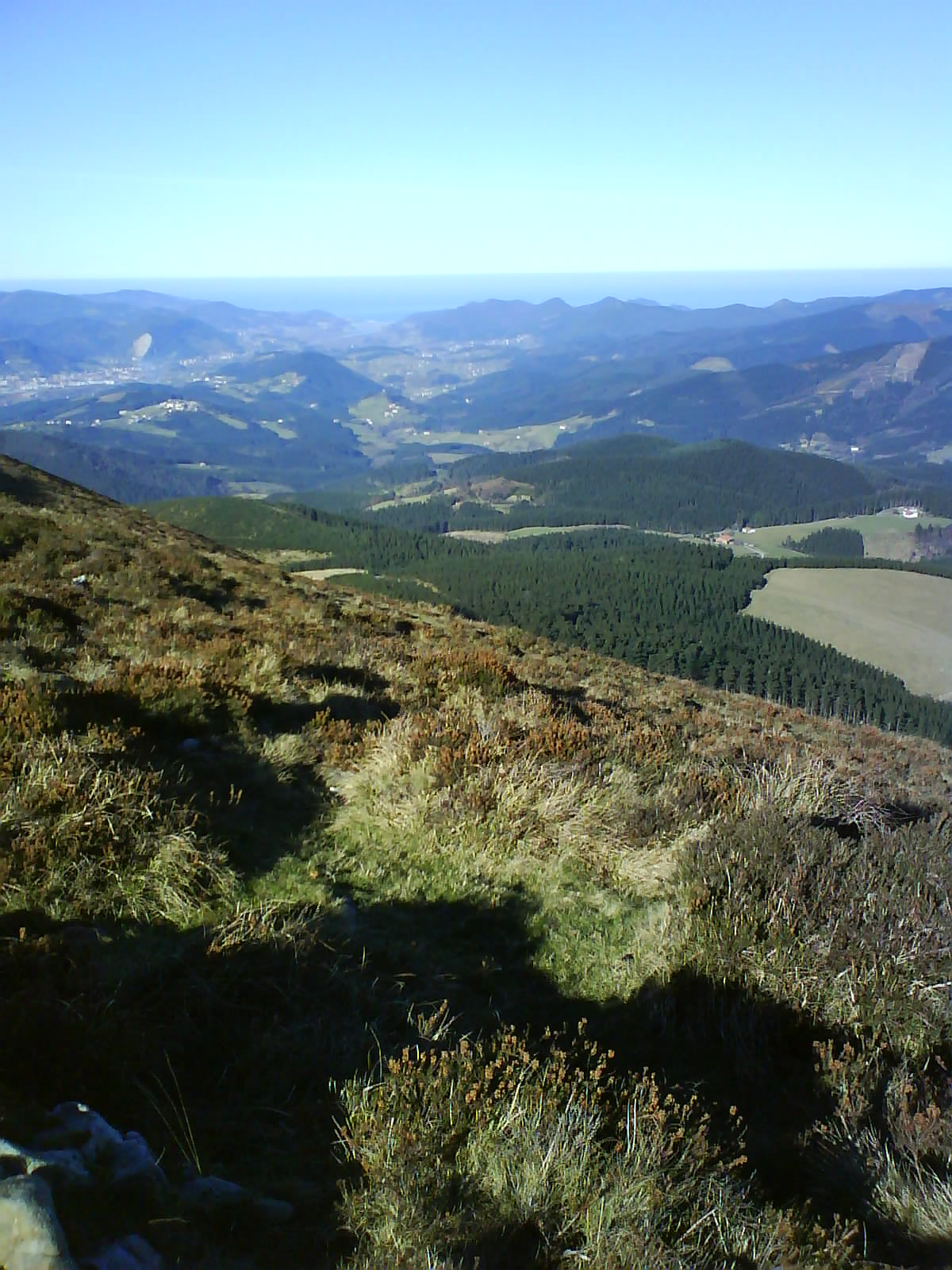 Vista de la Reserva de la Biosfera de Urdaibai desde Oiz.